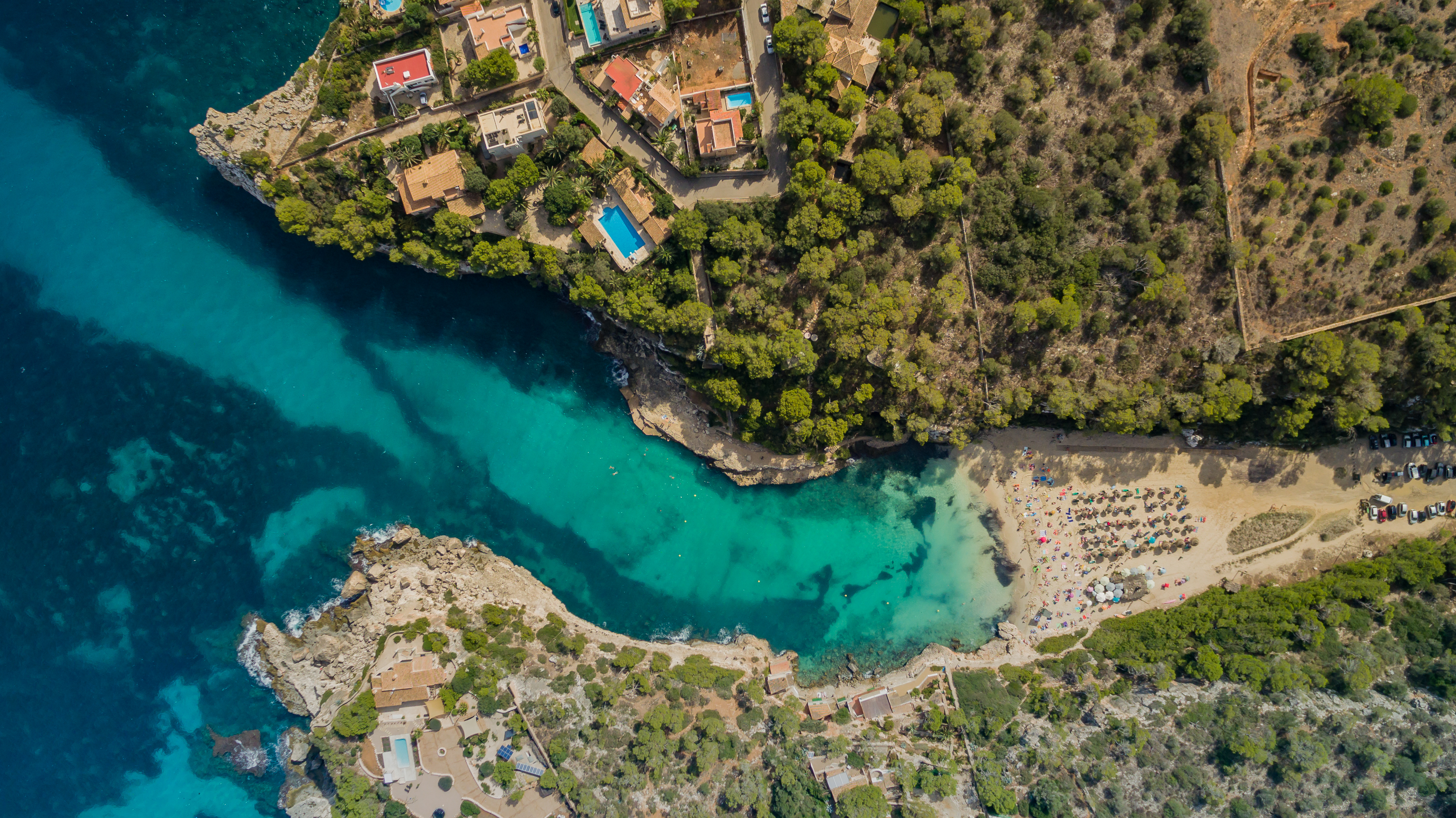 Mallorca schönste Strände Llombards